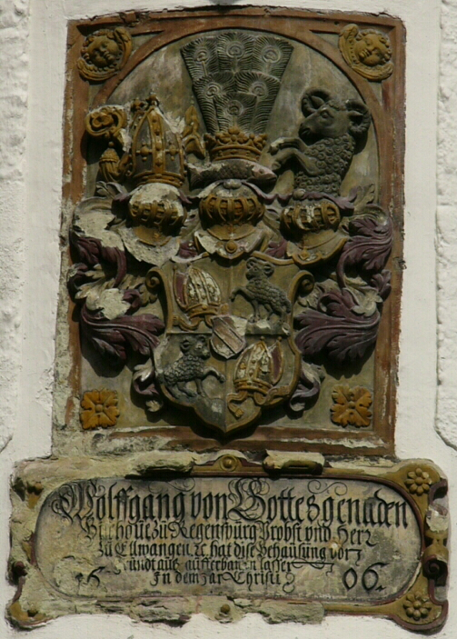 Regensburg, Unter den Schwibbögen 13, Wappen des Regensburger Fürstbischofs Wolfgang II. von Hausen